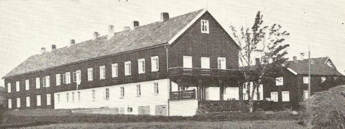 Solhaugen pensjonat i daværende Skatval kommune, i dag Aglo videregående skole i Stjørdal kommune.